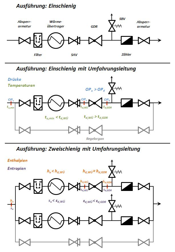 Schema verschiedener Gasdruckregelanlagen: Ein- und zweischienig, mit und ohne Umfahrungsleitung